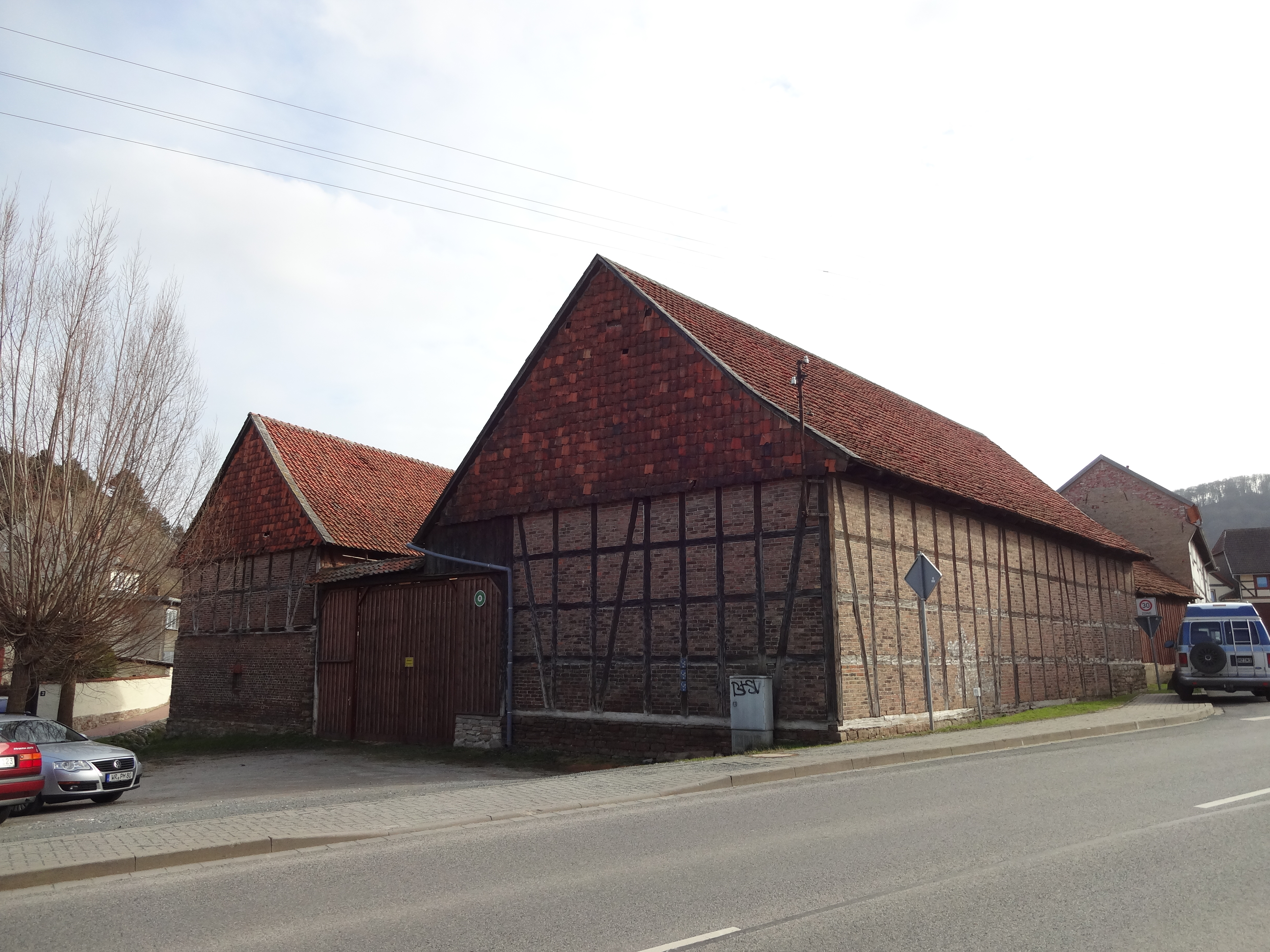 Denkmalgeschützter Bauernhof in der Wasserstraße 1 in Benzingerode (Ortsteil von Wernigerode)